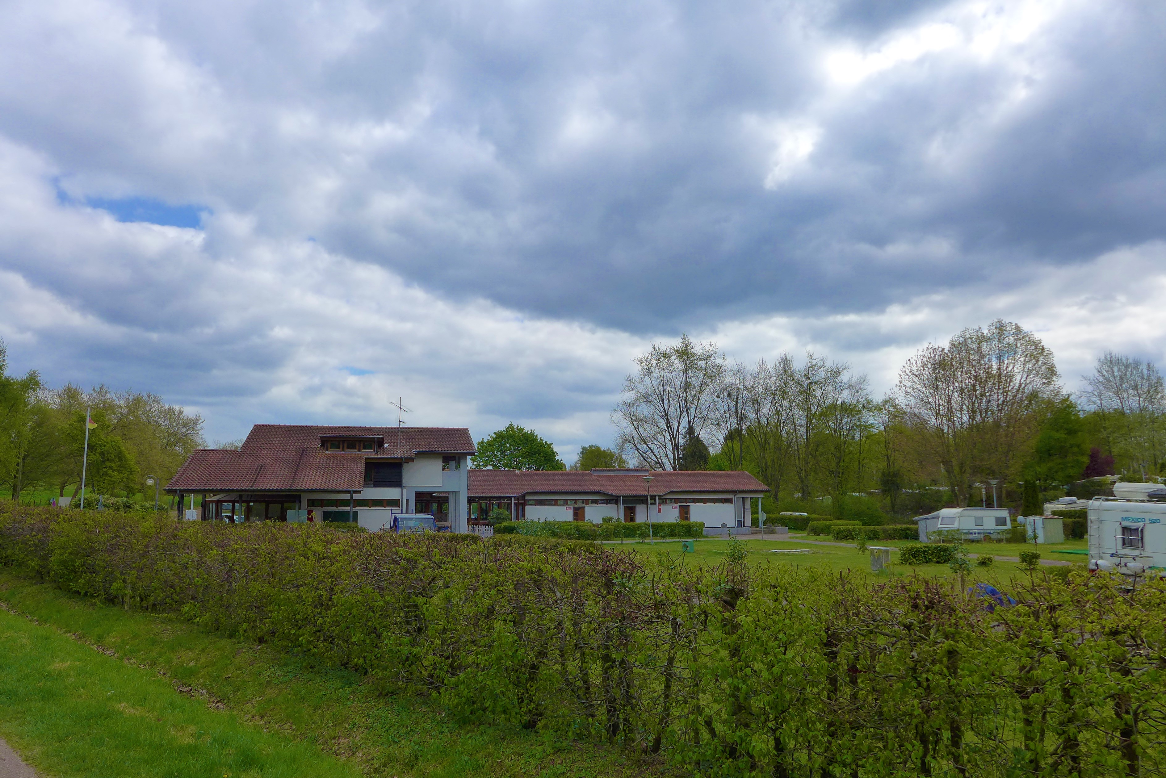 Wallerfangen, Campingplatzes im Blauloch